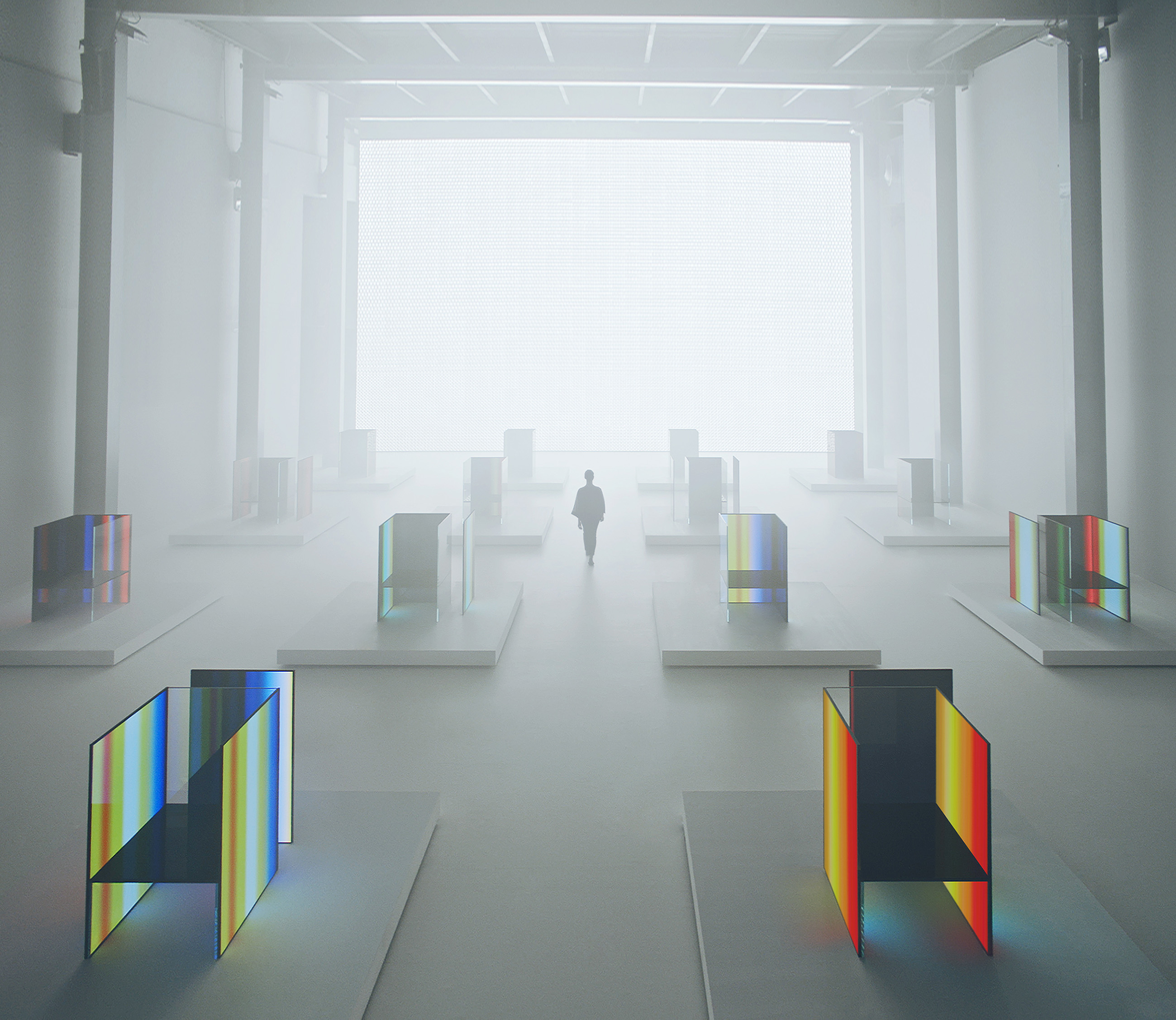 S.F Senses of the Future bu Tokujin Yoshioka